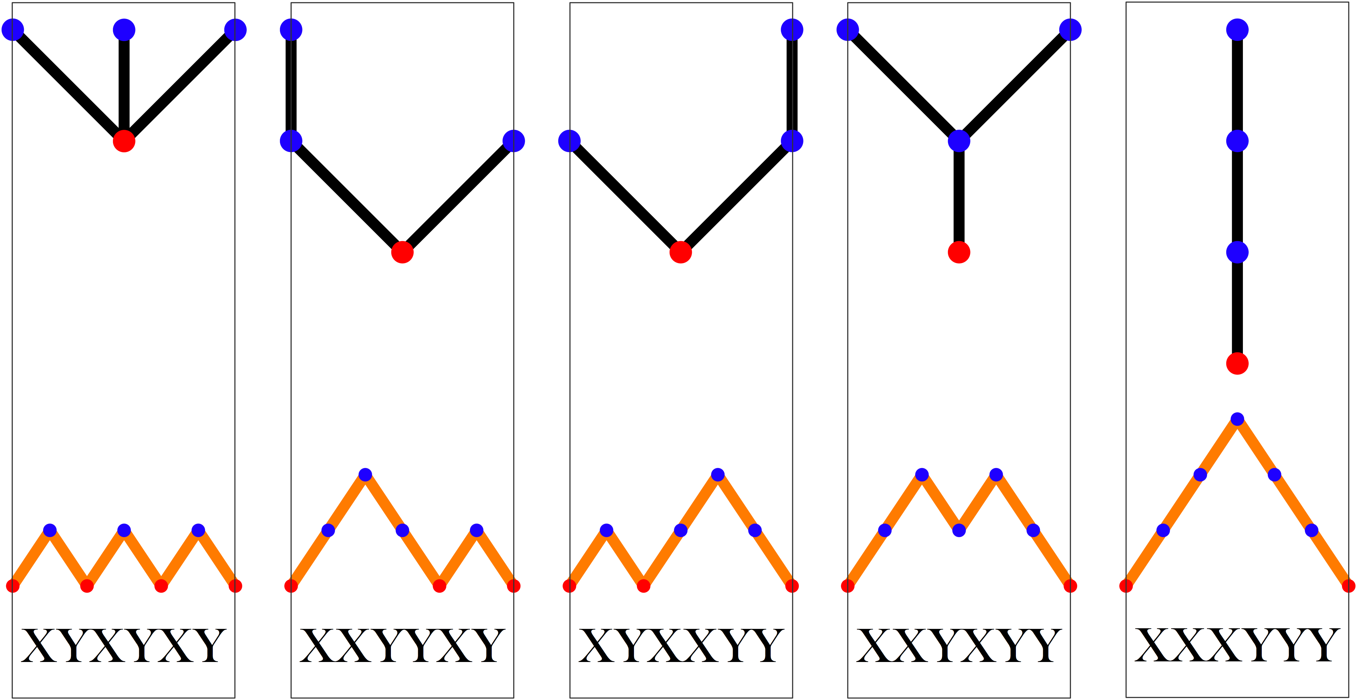 Bijection arbres-contours : cas du 3ème nombre de Catalan